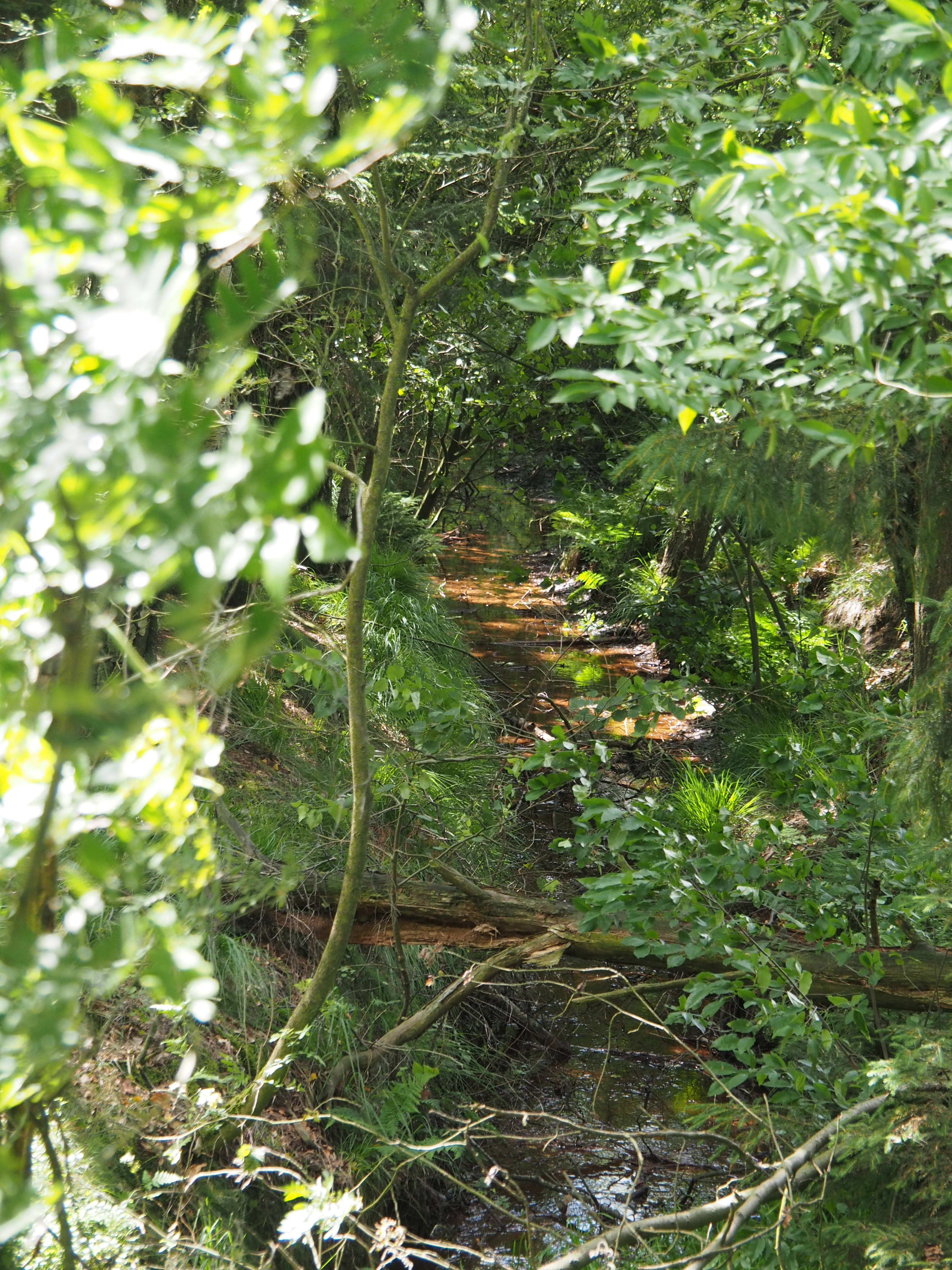 Die Örtze auf dem Truppenübungsplatz Munster-Nord, kurz nach verlassen der Munoseen